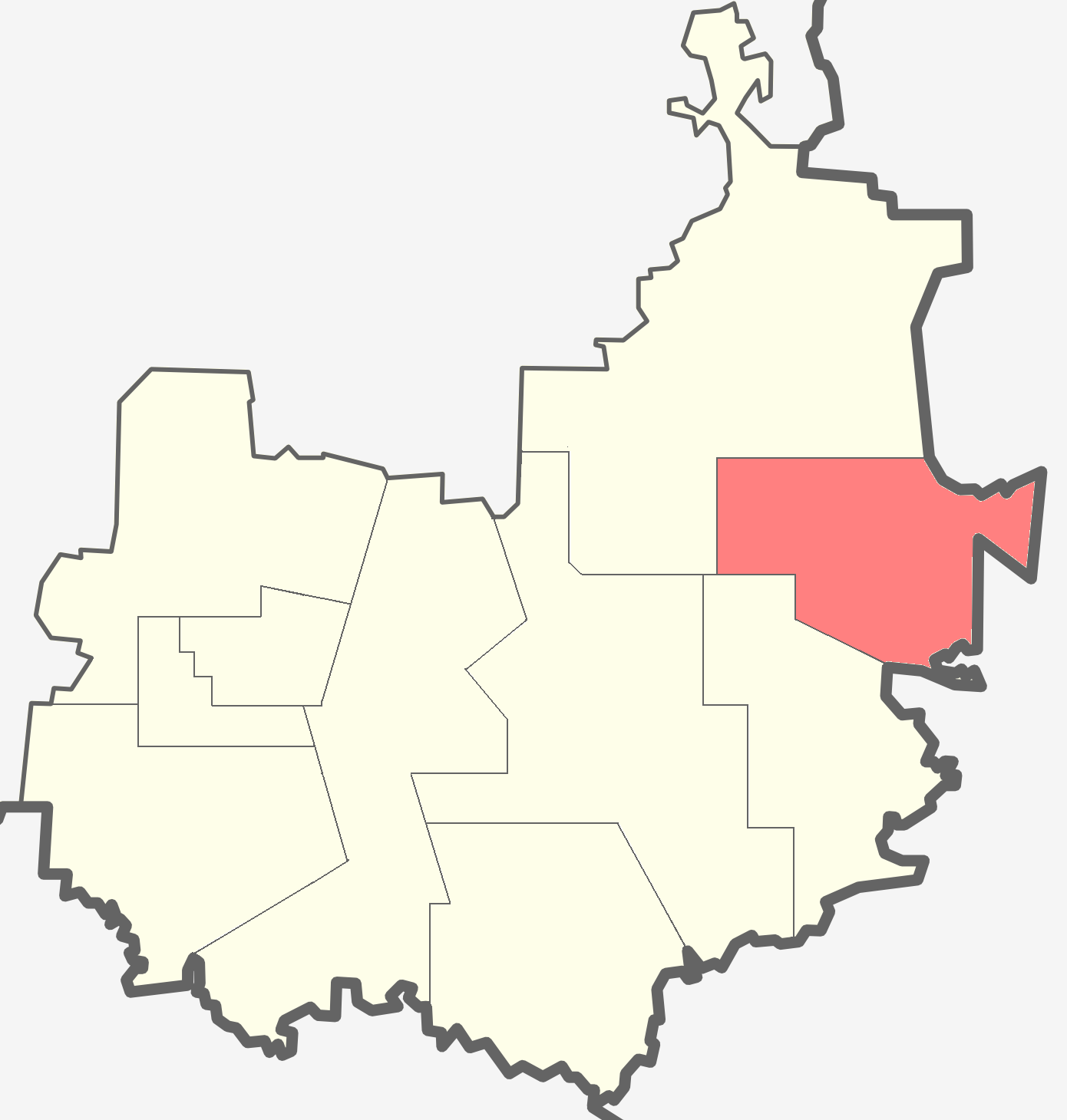 Заборьевское сельское поселение на карте Бокситогорского района Ленинградской области.